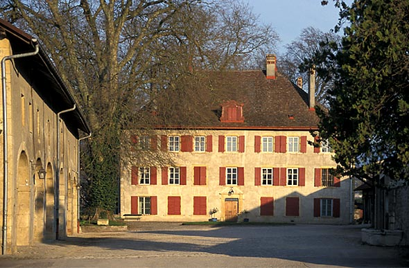 Das obere Schloss (Château En-Haut) in Eclépens.